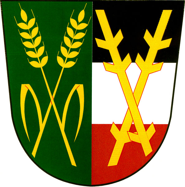 Znak obce Úhřetice